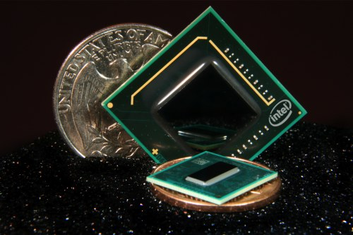 Intel Atom Z550 - самый энергосберегаемый процессор - 2.4 V на 2 Ггц.